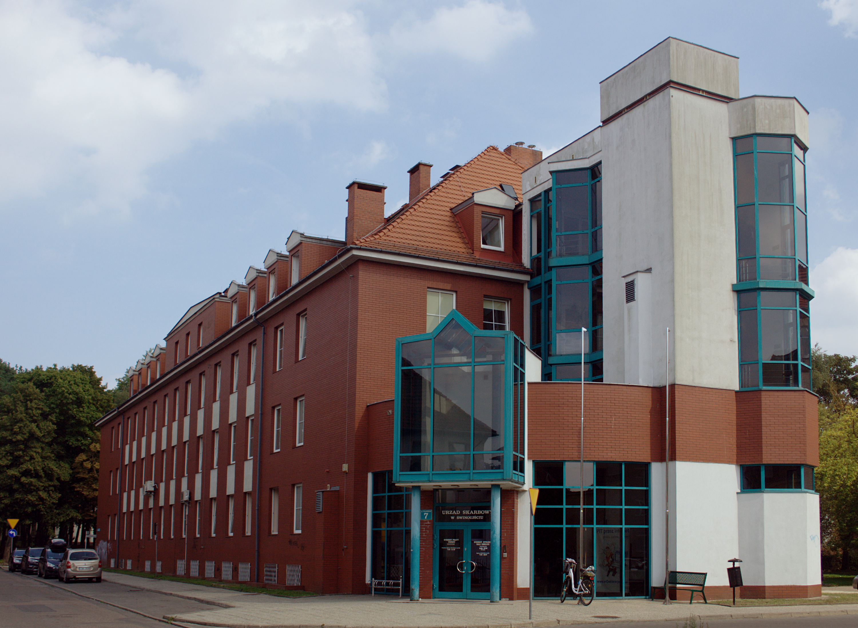 Budynek urzędu skarbowego w Świnoujściu